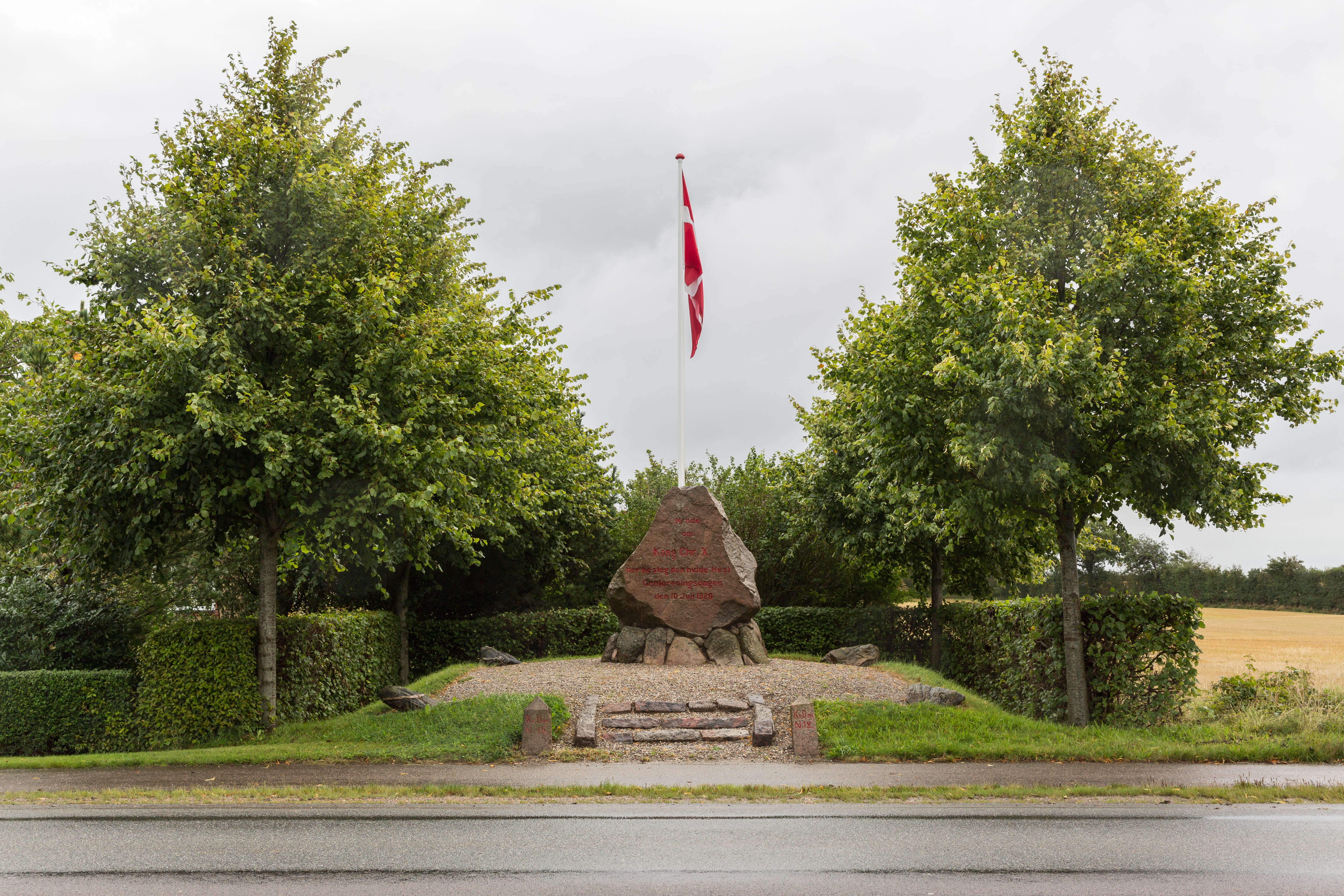 Stedet hvor Christian x steg til hest inden turen over den gamle grænse